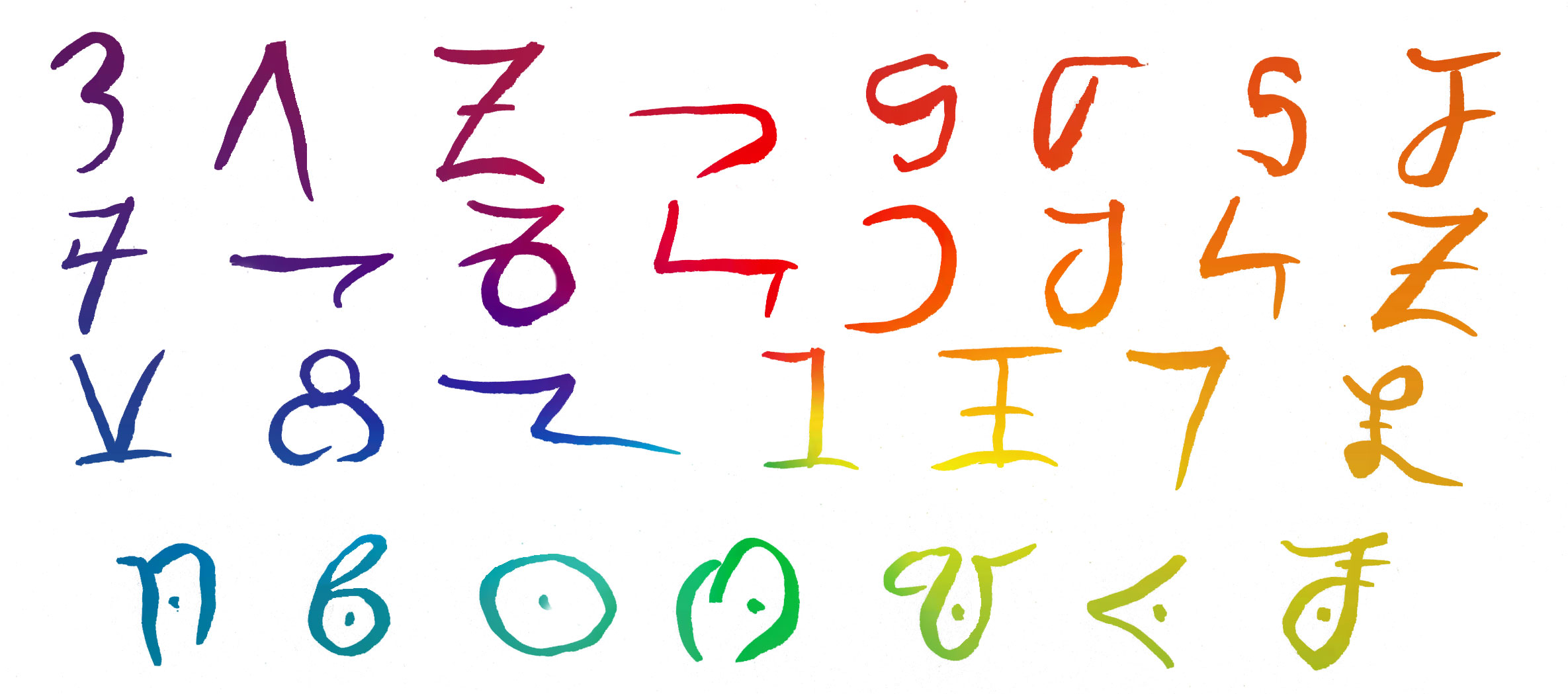 Signes de l'alphabet Bassa